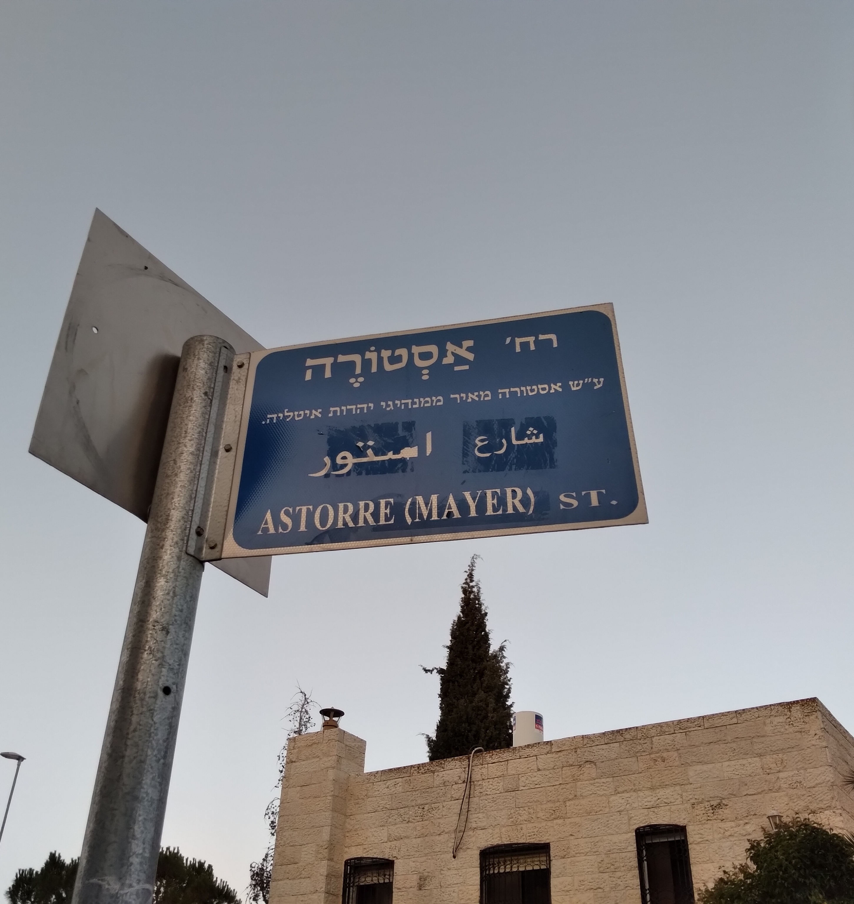 שלט רחוב בירושלים, על שמו של